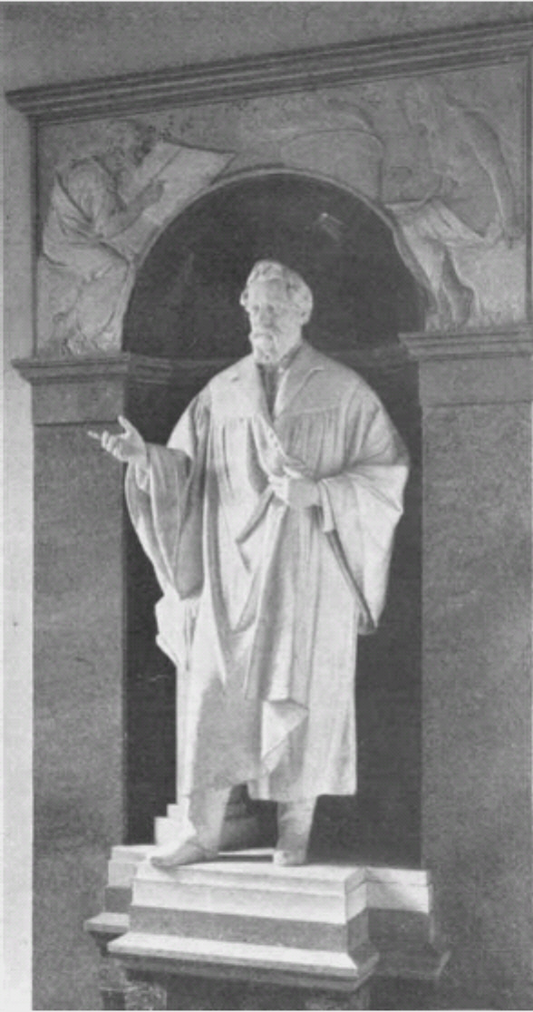 Marmor-Standbild von A. W. v. Hofmann bei Einweihung des Hofmann-Hauses in Berlin. (im 2. Weltkrieg 1944 zerstört)